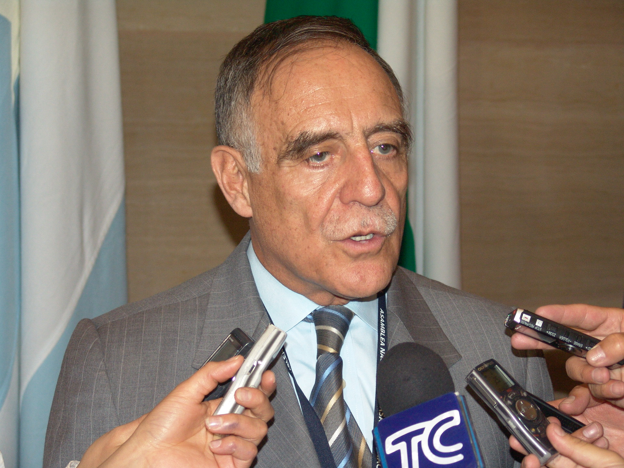 Asambleísta, Paco Moncayo en entrevista